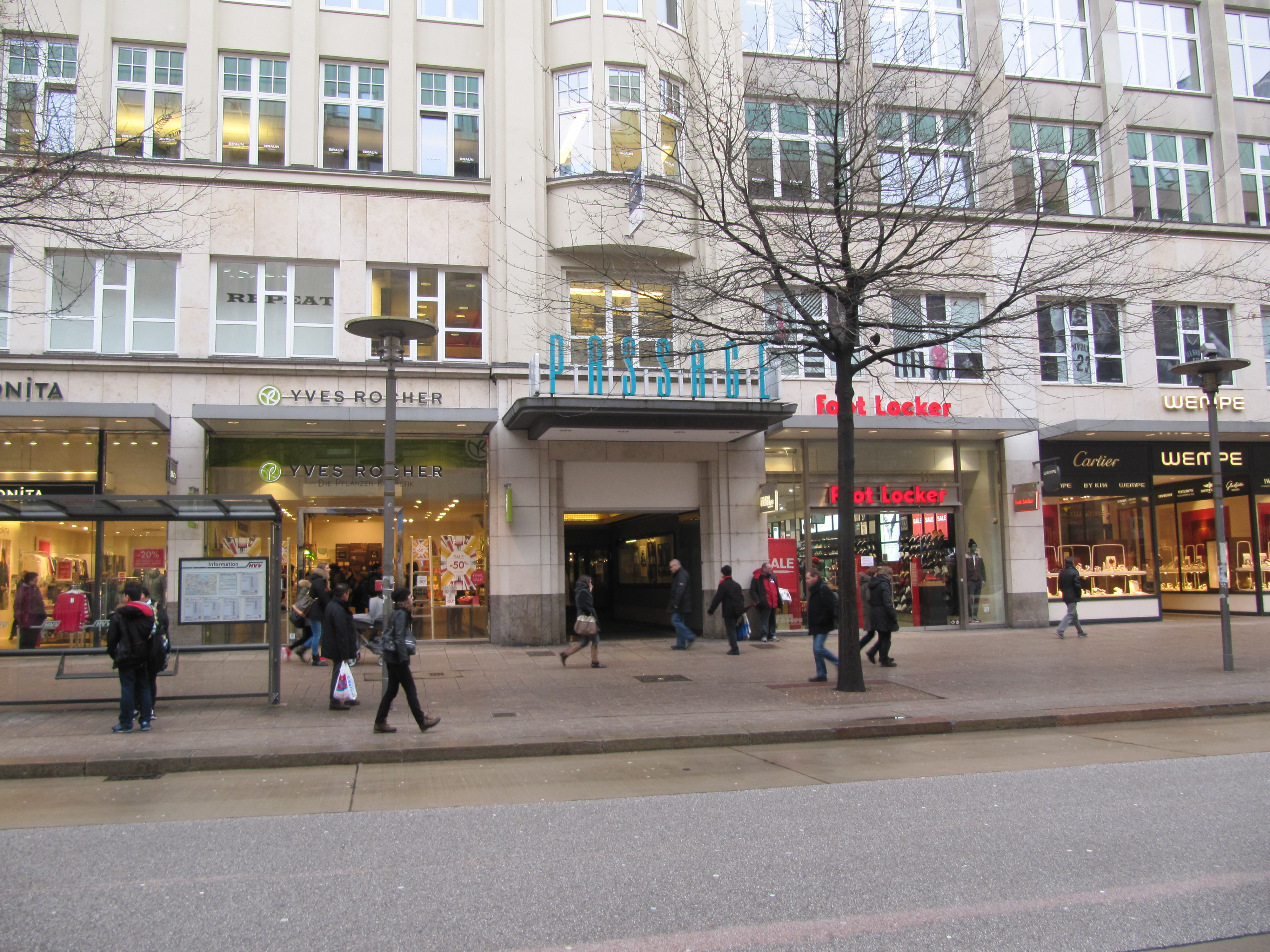 Eingang des Passage-Kinos, Hamburg